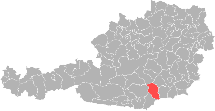 Bezirk Wolfsberg in Österreich